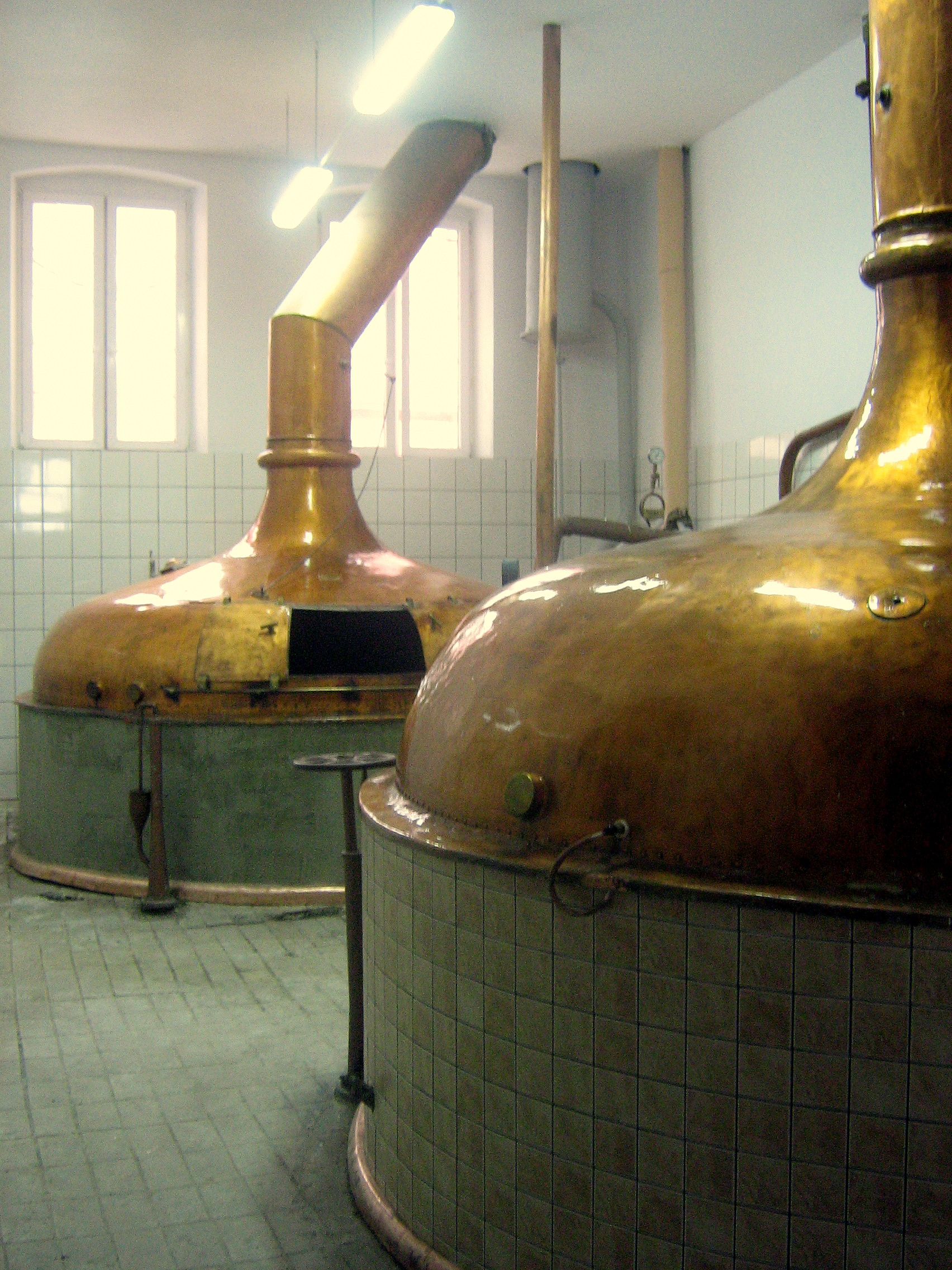 Warzelnia w 2010 r. Kadź warzelna i zacierna